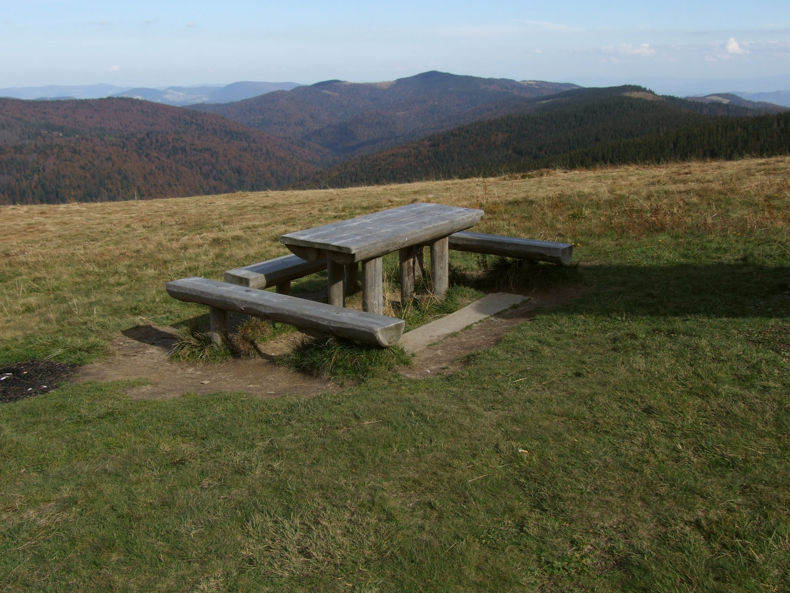 Polana Jaworzyna Kamienicka (Gorce)